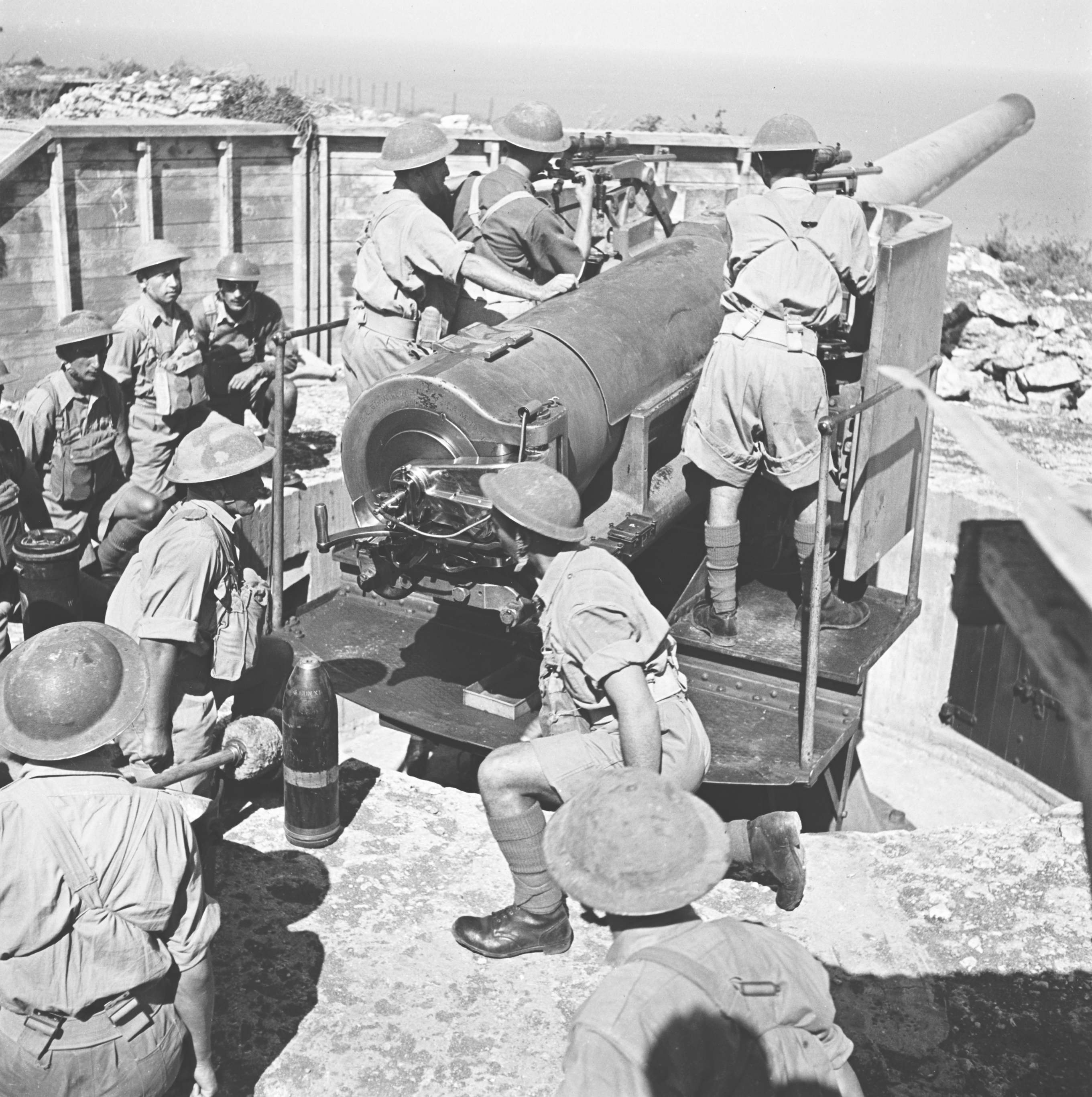 אוסף צילומים של הצלם זולטן קלוגר טווח מספרי התשלילים 16162 - 16270: 14th Coast Regiment, Royal Artillery, Haifa.